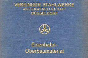 Eisenbahn-Oberbaumaterial 1929. Hrsg.: Vereinigte Stahlwerke A.-G., Zentralwerbestelle Dortmund.